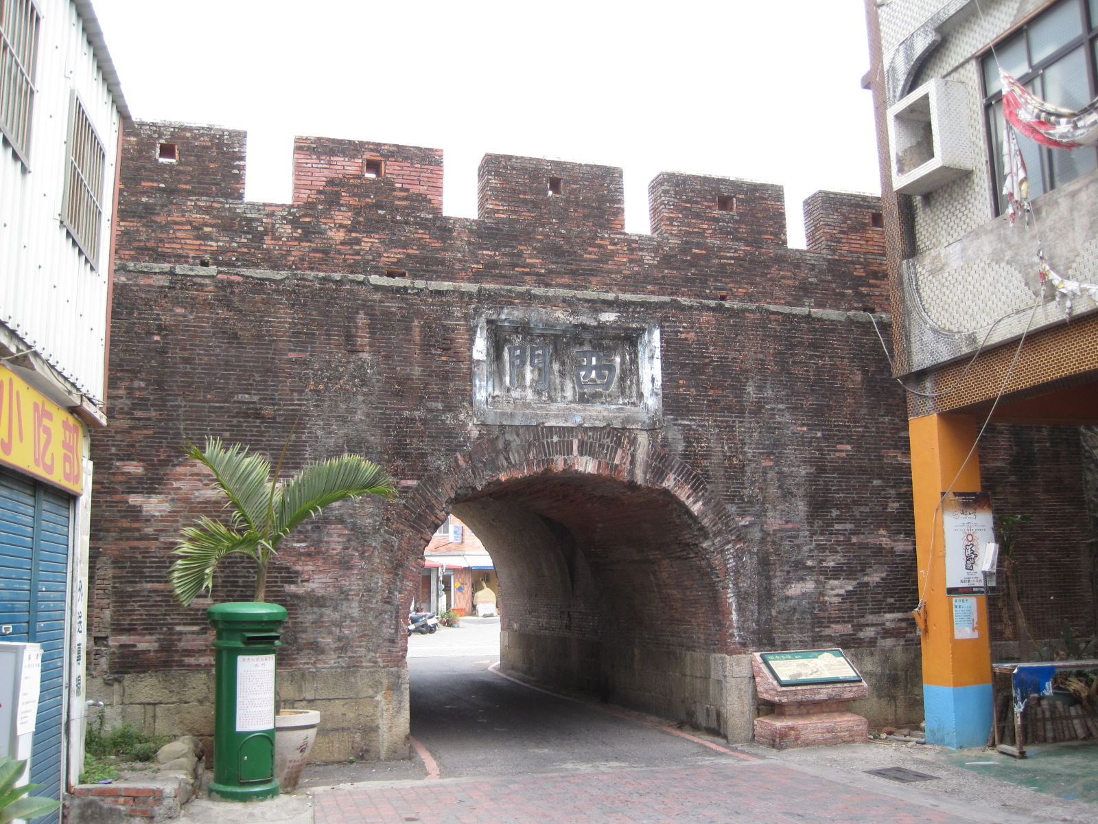 恆春縣城西門